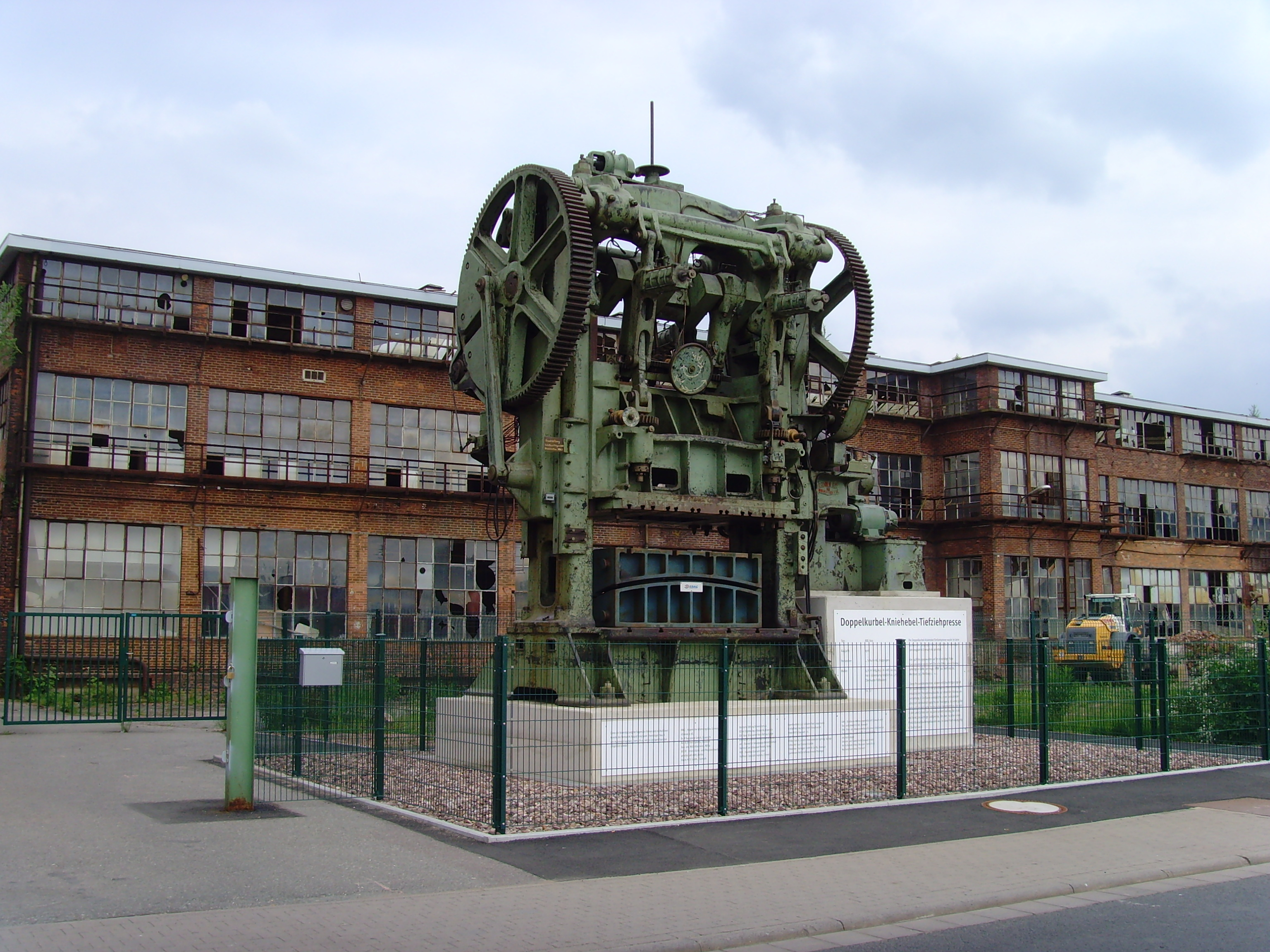 Presse der Göppinger Schuler AG auf dem Werksgelände des ehem. Automobilwerks in Eisenach, jetzt automobile welt eisenach